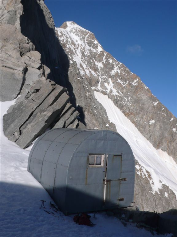 Le bivouac E. Canzio au col des Grandes Jorasses